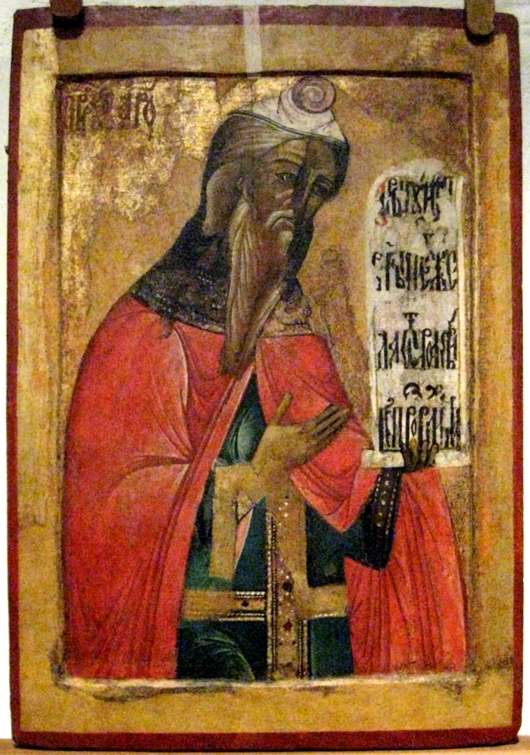 Пророк Аарон. Иконописец Терентий Фомин (?) Вологда (уп. 1646–1670). Церковь Епифания Кипрского Кирилло-Белозерского монастыря